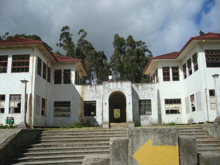 Fachada principal del antiguo Sanatorio Durán. Costa Rica.